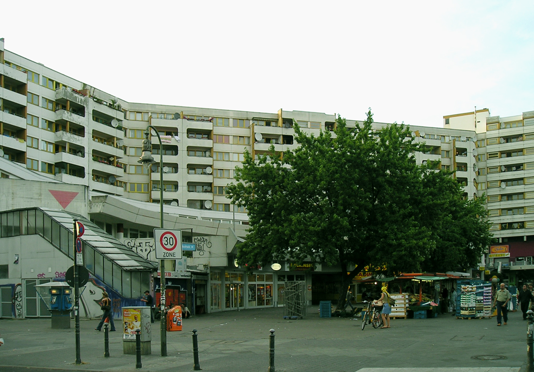 sog. Neues Kreuzberger Zentrum (NKZ) am Kottbusser Tor, Berlin-Kreuzberg